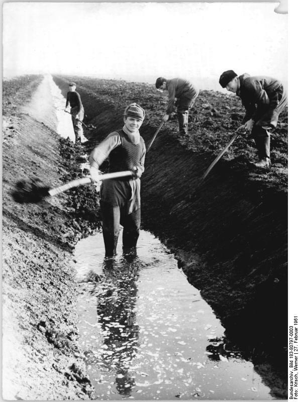 Anlegen eines Grabens Zentralbild Krisch-Leske 27.2.1961 Jugendobjekt Lewitzgebiet Die Jugendlichen des Bezirkes Schwerin stellten sich die Aufgabe, das Grabensystem des Lewitzgebietes instandzusetzen. Im Jahr 1960 waren 1200 Freunde im vierwöchigen Einsatz in diesem Objekt und schafften dabei einen Wert von 960.000 .- DM. Unter anderem führten sie Meliorationsarbeiten im Wert von 373 400.-- DM und Wegebau im Wert von 281 900.- DM durch. Im NAW wurden 2346 Stunden geleistet. Der LPG "Ernst Thälmann" in Tramm wurde im NAW eine 2 ha große Kälberkoppel eingerichtet. Für das Jahr 1961 haben sich die Jugendlichen des Bezirkes Schwerin vorgenommen, im Lewitzgebiet Werte zu schaffen, die weit über 1 Million DM hinausgehen. UBz: Weithin ziehen sich die Gräben im Lewitzgebiet. Mit einem Grabenräumgerät oder Bagger werden die Gräben ausgehoben. Danach werden die Böschungen und die Sohle der Gräben mit der Schaufel planiert. Von links nach rechts: Klaus Jakubowski. Friedhelm Peyers, Frank Elstner und Wilhelm Schöntag, alle arbeiten als Traktoristen-Lehrlinge in der MTS Jessnitz.